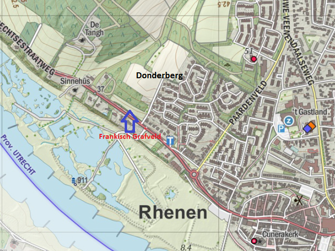 Kaart Frankisch Grafveld in Rhenen. Gelegen aan de voet van de Donderberg (zuidflank).